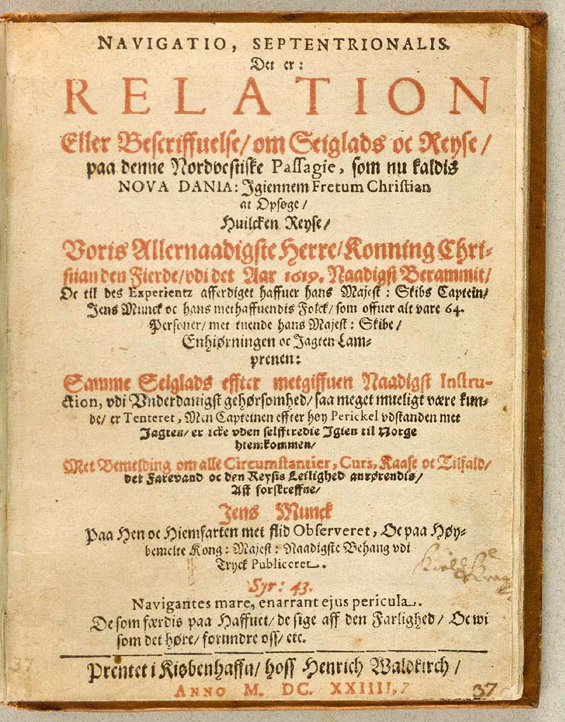 Jens Munk: Navigatio, septentrionalis Det er: Relation Eller Bescriffuelse om Seiglads oc Reyse paa denne Nordvestiske Passagie, som nu kaldis Nova Dania. København: Henrich Waldkirch 1624.